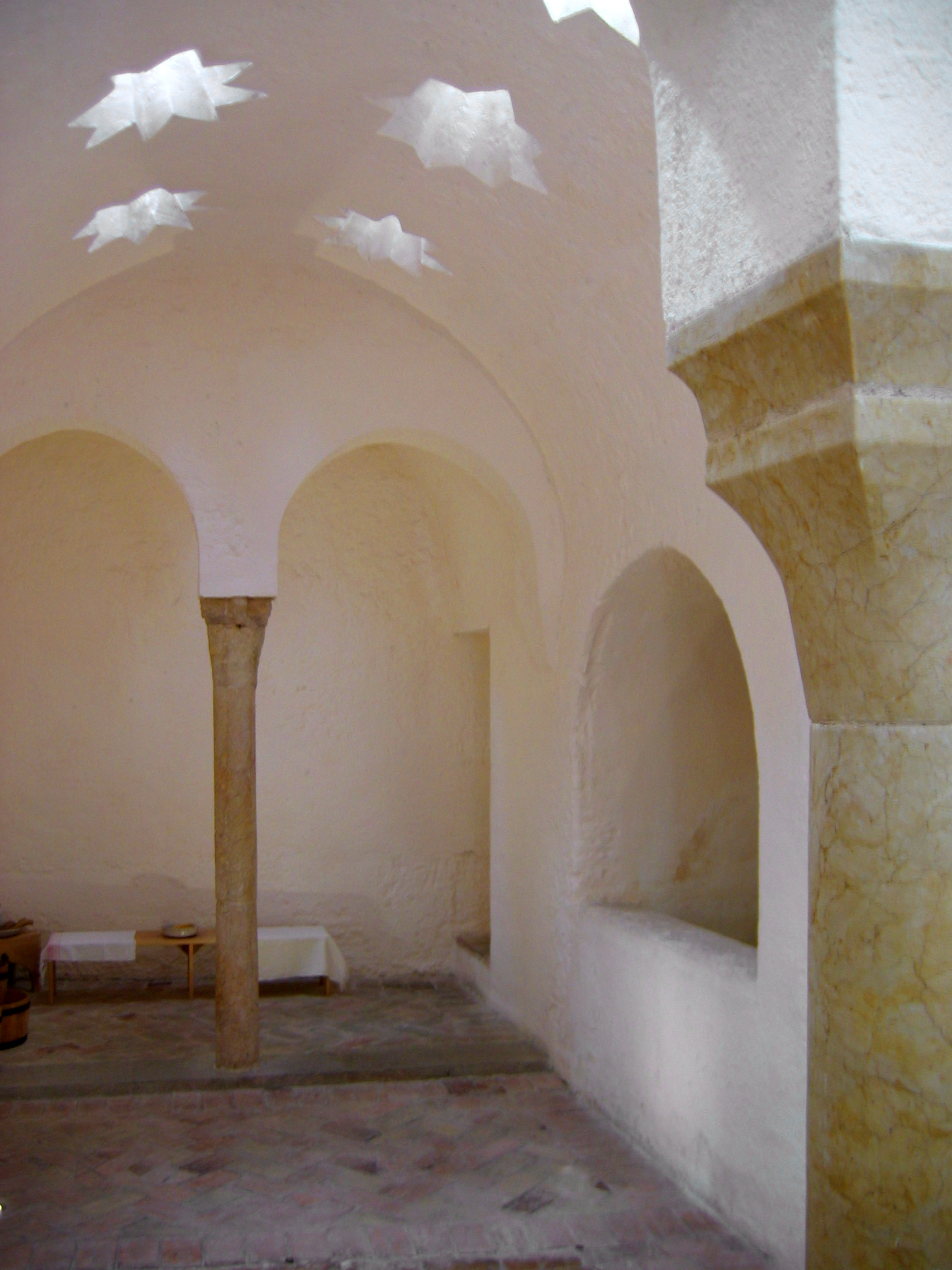 Vista de la sala fría Sala fría de los Baños del Almirante (Banys de l'Almirall), en Valencia. Foto de Chosovi